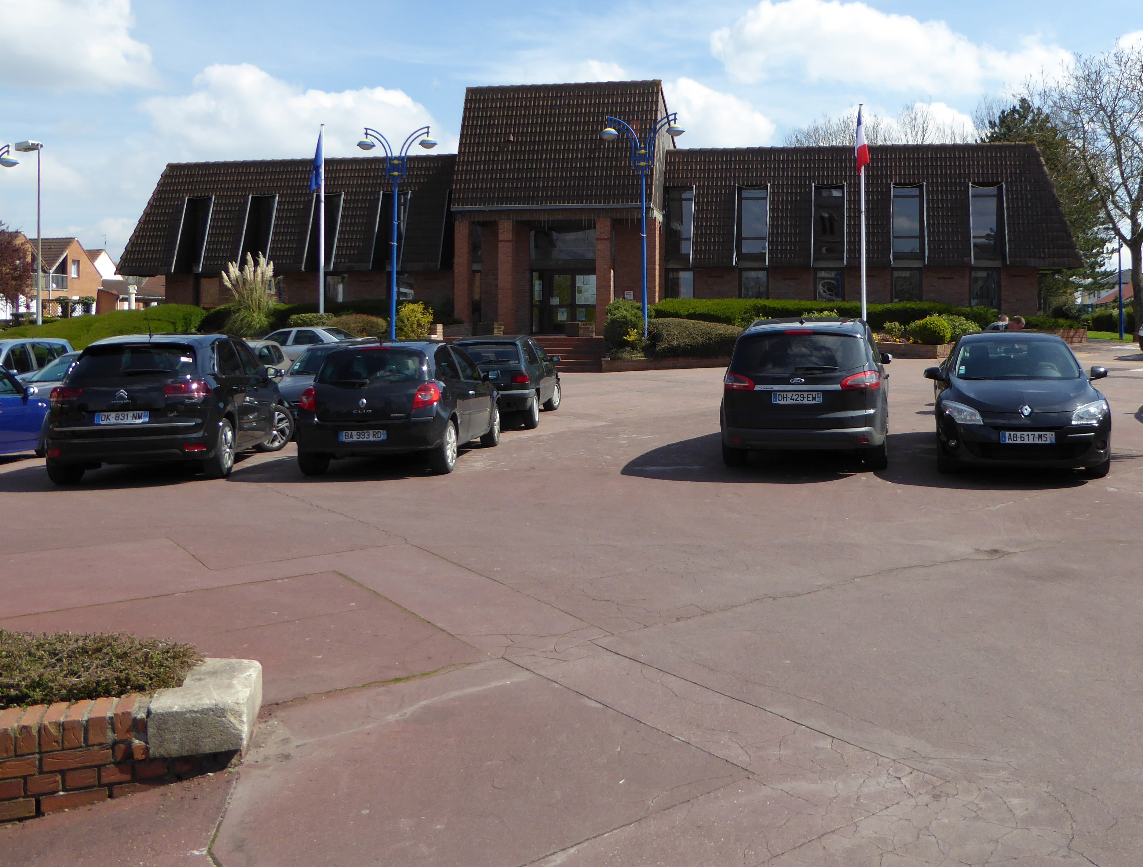 La mairie Noyelles-lès-Vermelles , Pas-de-Calais, Nord-Pas-de-Calais-Picardie France.